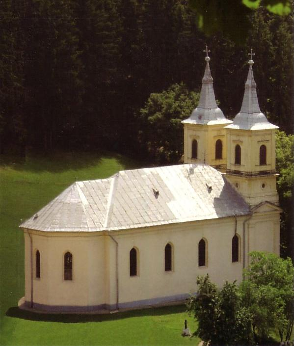 Mănăstirea Nicula